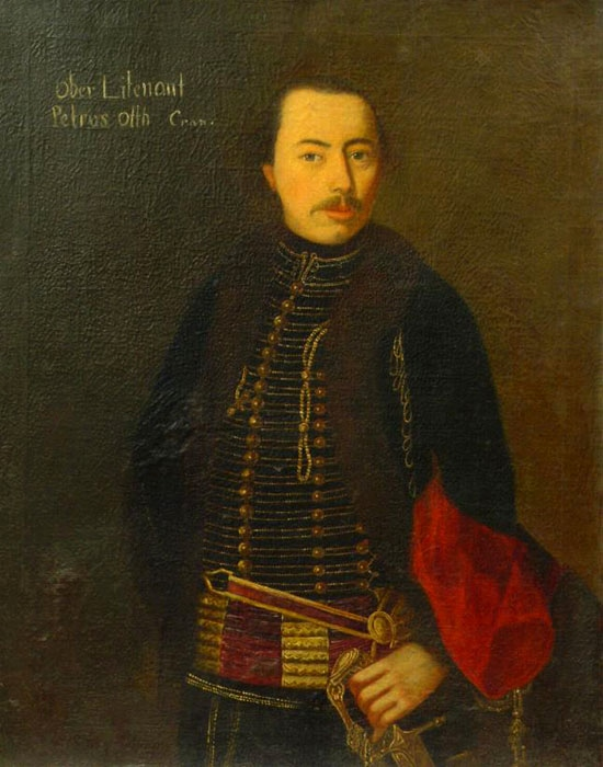 Peter Karl Ott (1738-1809), lieutenant-colonel de hussards et futur général des Habsbourg.